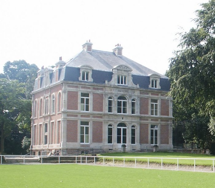 Le château Baratte situé à Templeuve dans le Nord. Il sert d'hôtel de ville depuis novembre 2002.